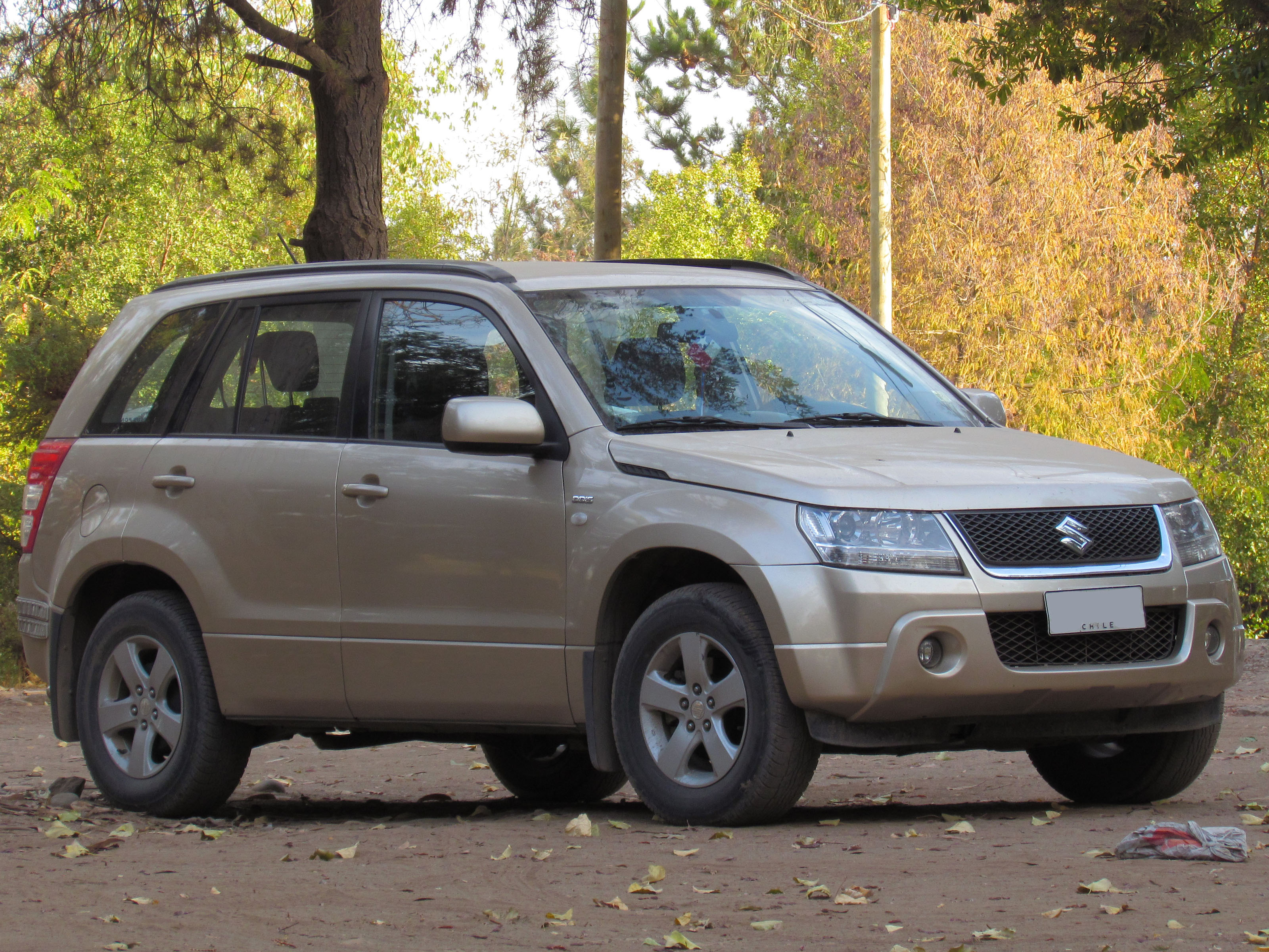 Suzuki Grand Nomade 1.9 DDiS GLX 2008